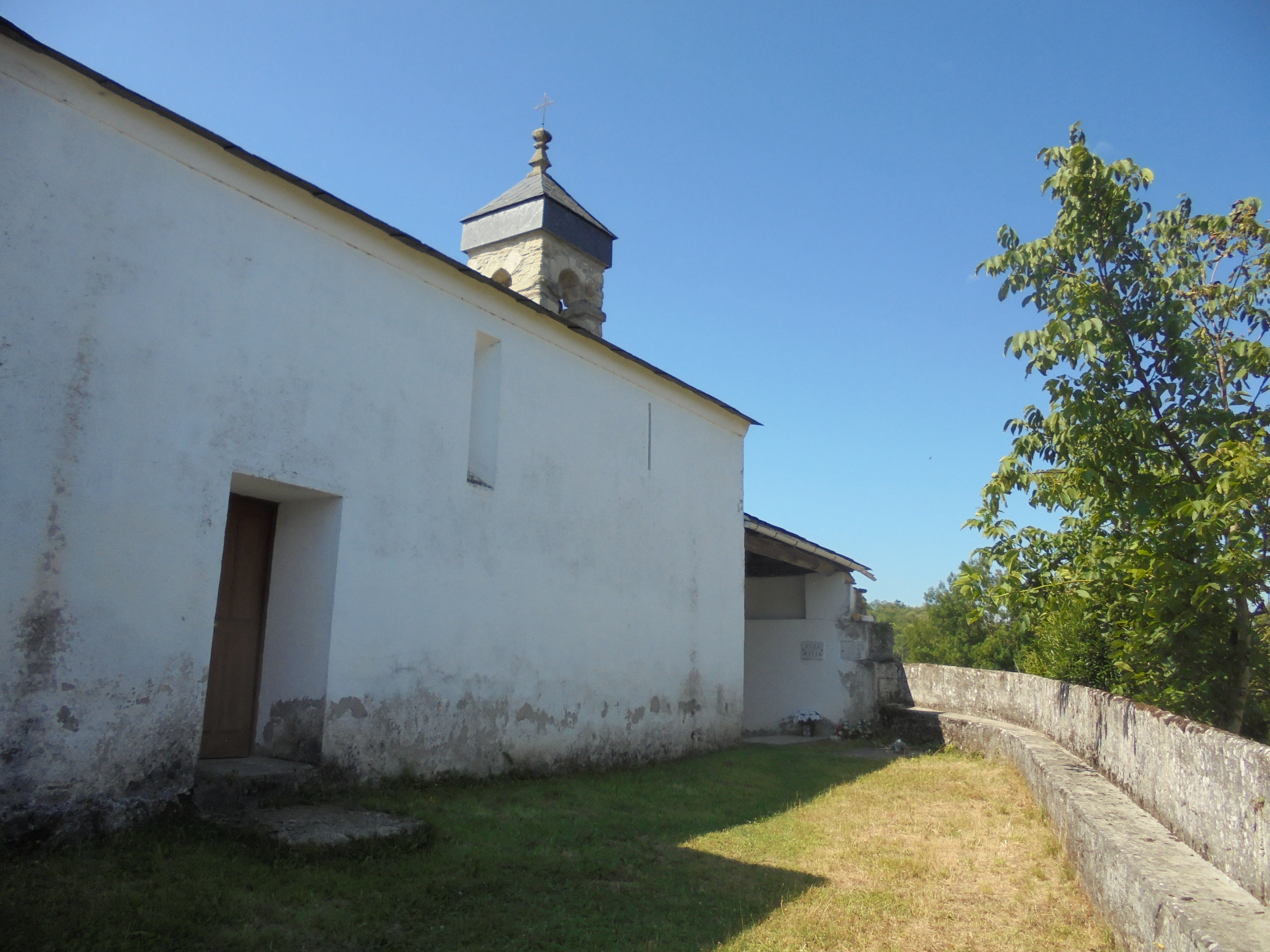 Igrexa de Santa María de Costantín